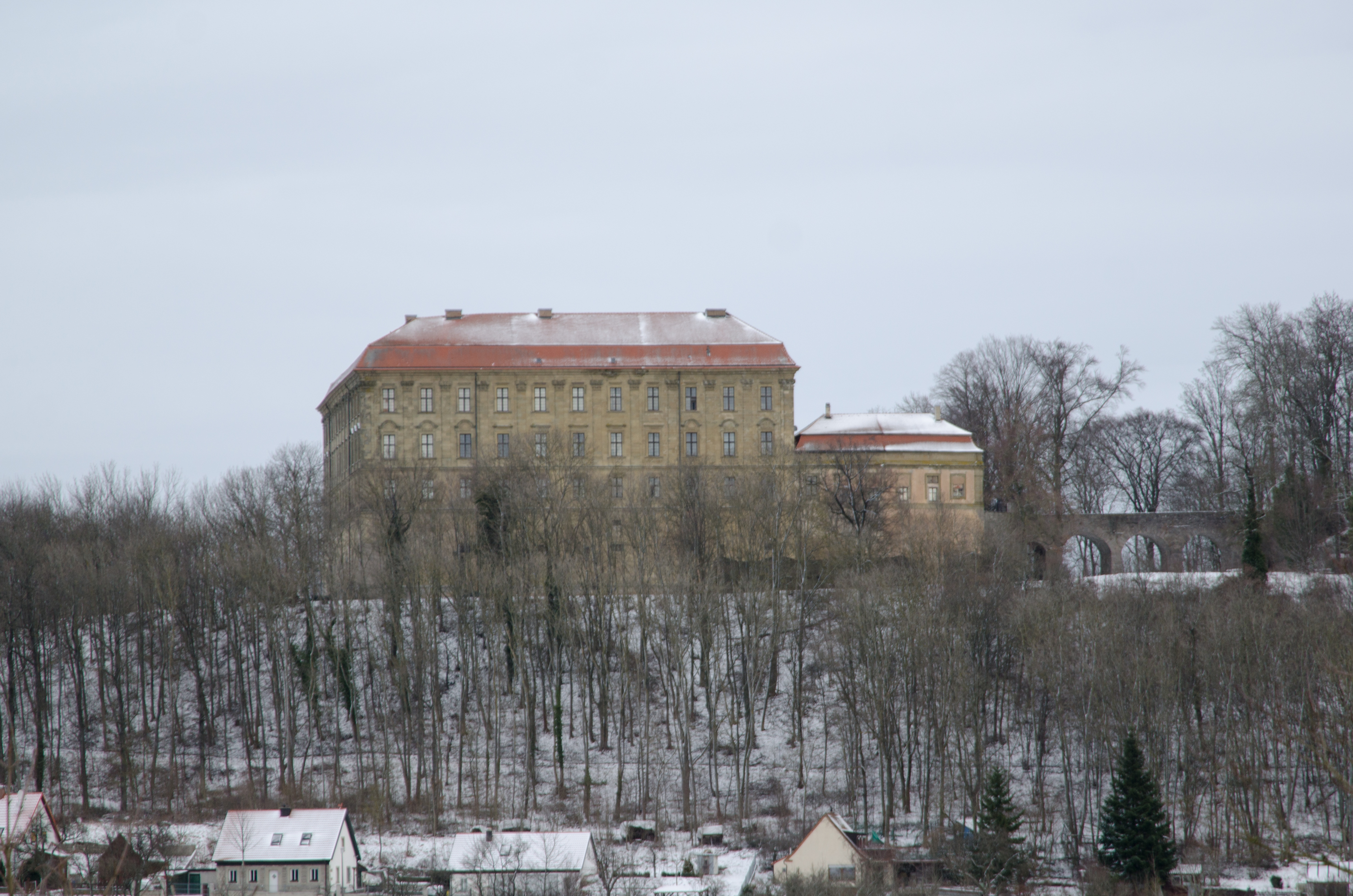 Schillingsfürst, Schloss, vom alten Friedhof gesehen